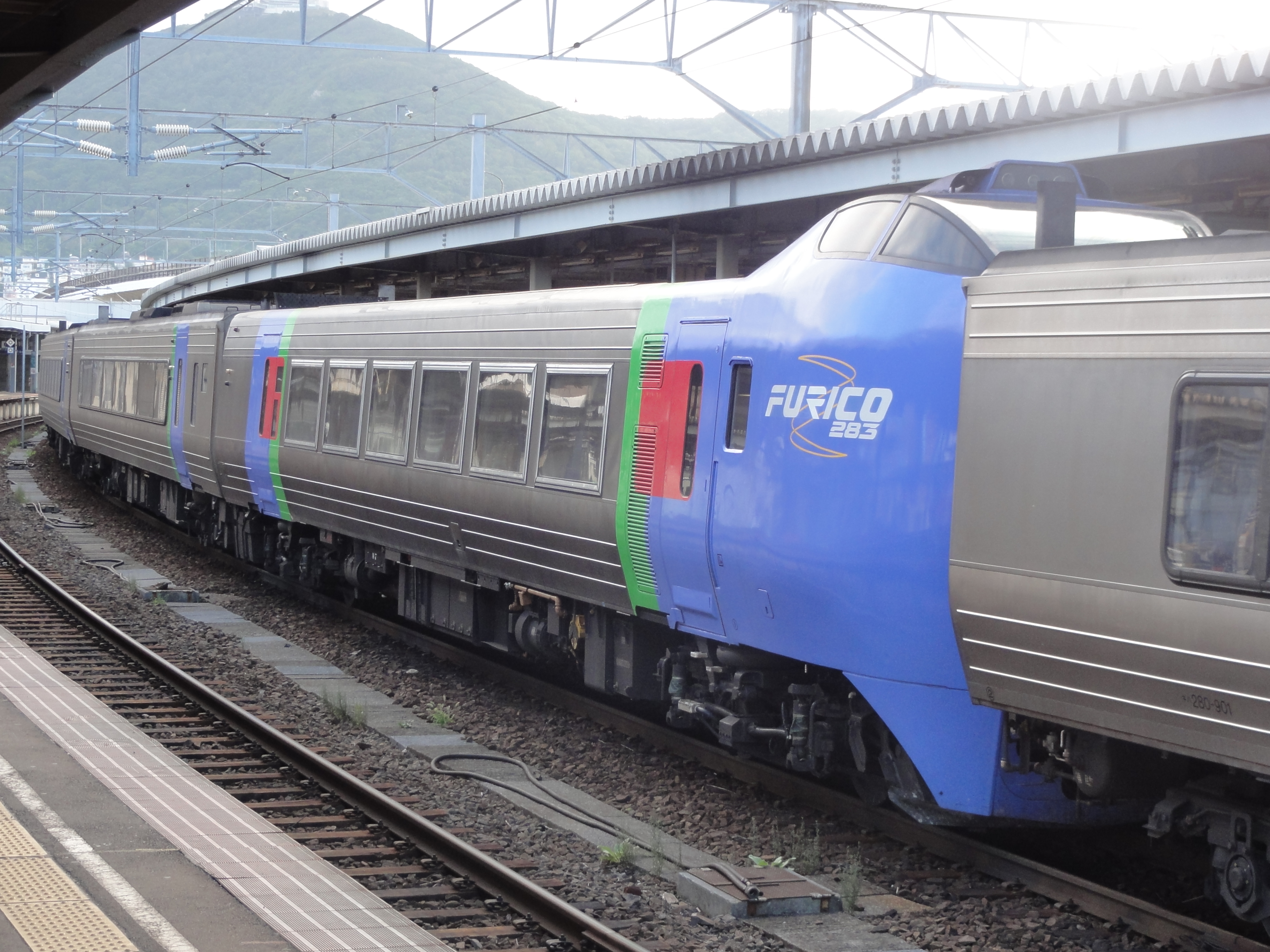 JR北海道キハ283系気動車